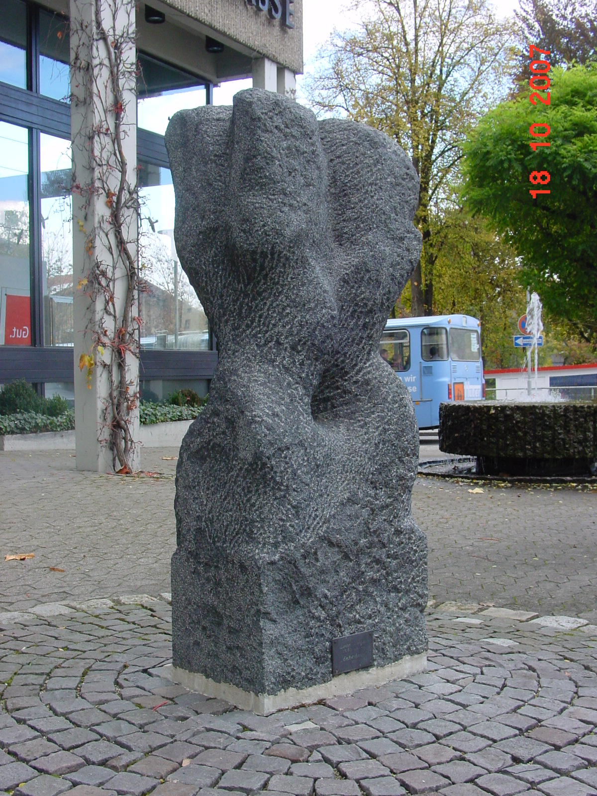 Skulptur im öffentlichen Raum